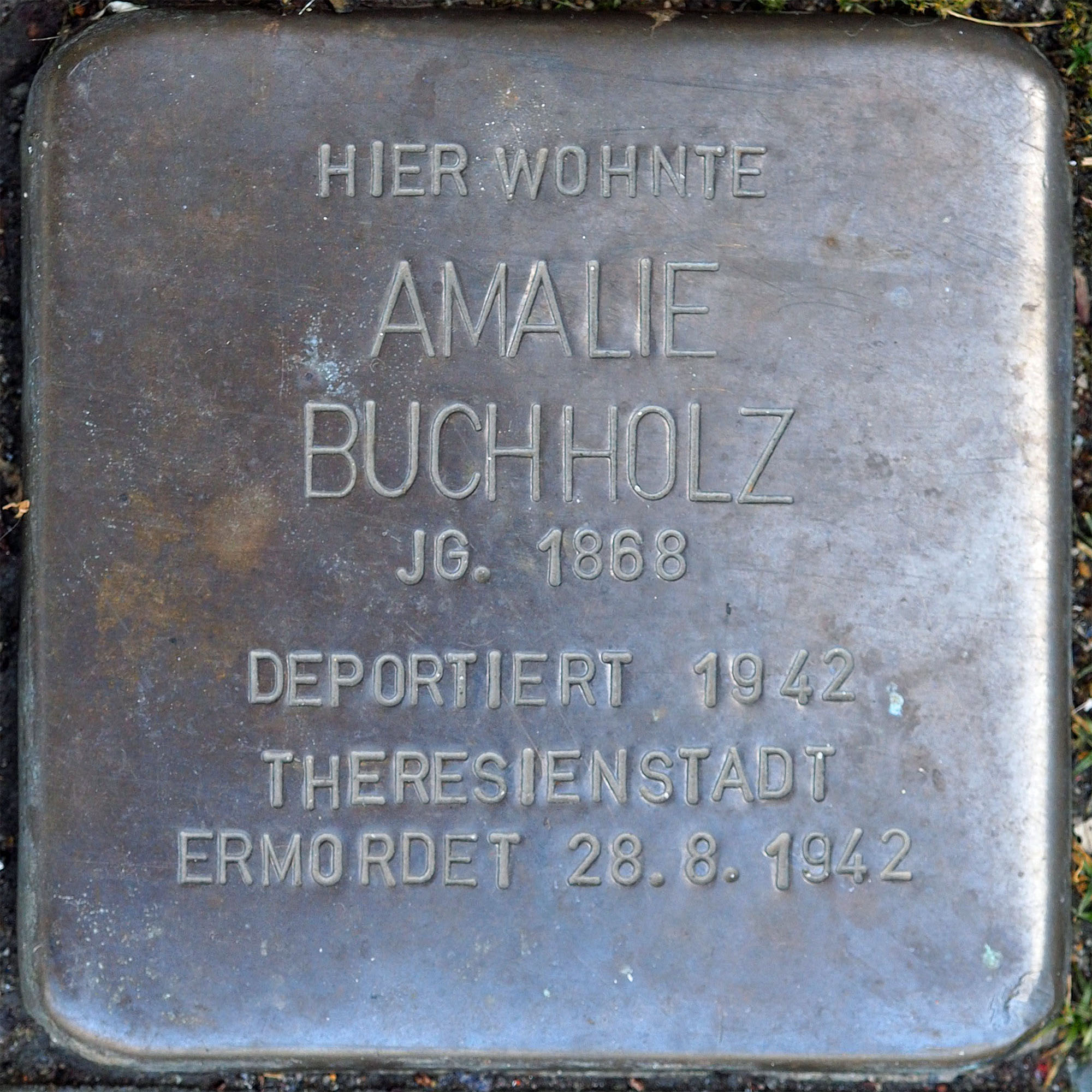 Stolpersteine MG: Buchholz, Amalie